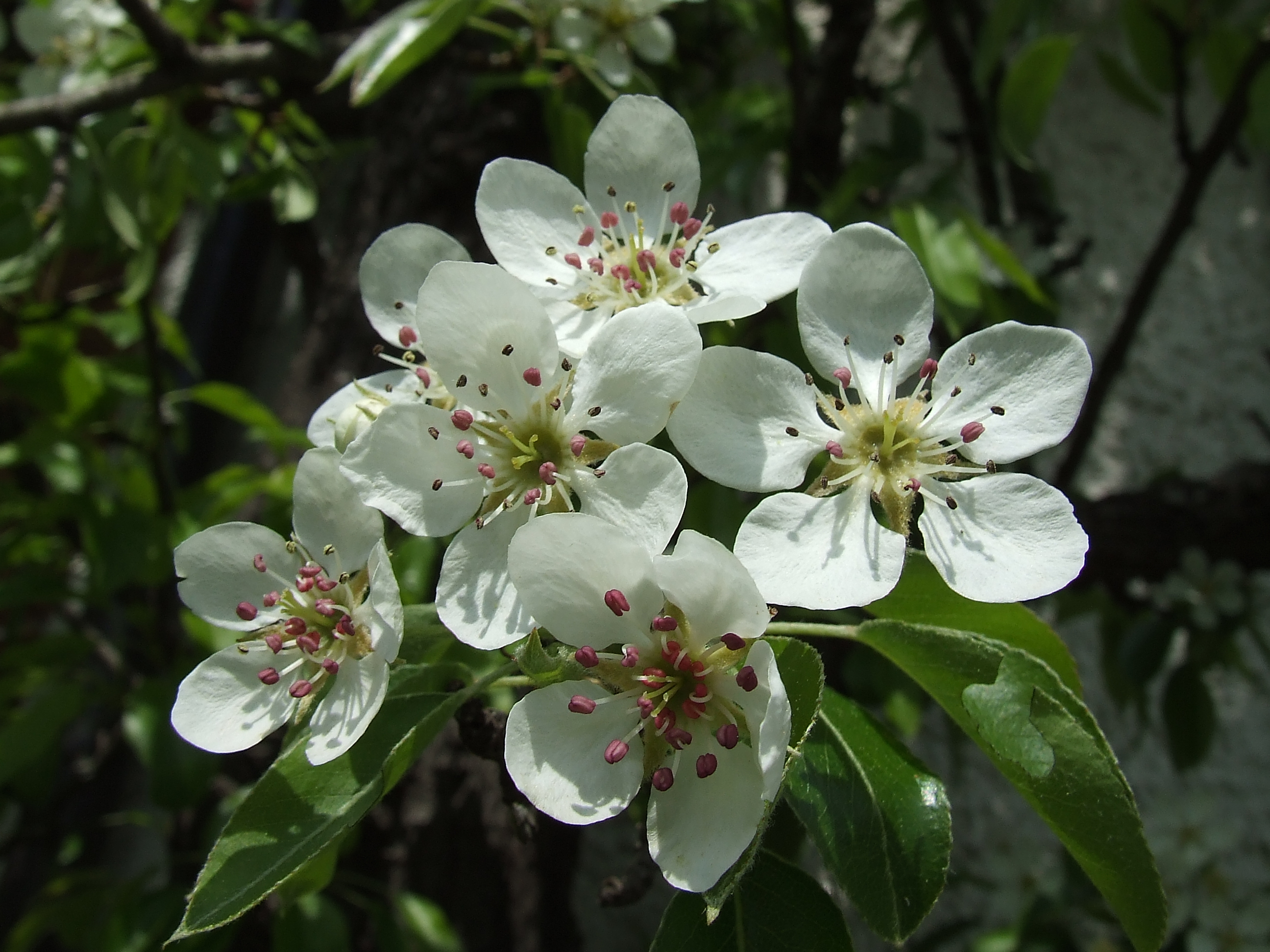 Blüten eines Birnbaums in der Schweiz